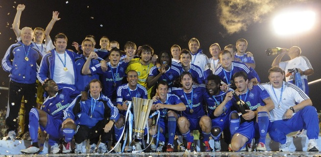 "Динамо" (Київ) володар Суперкубку України 2011